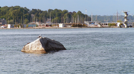 Les Pierres du Niton dans la Rade de Genève, Geneva - Switzerland.